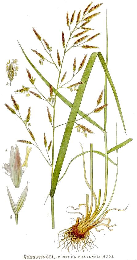 Festuca pratensis Huds. s. l. Original Description "Ängssvingel", Festuca pratensis Huds.